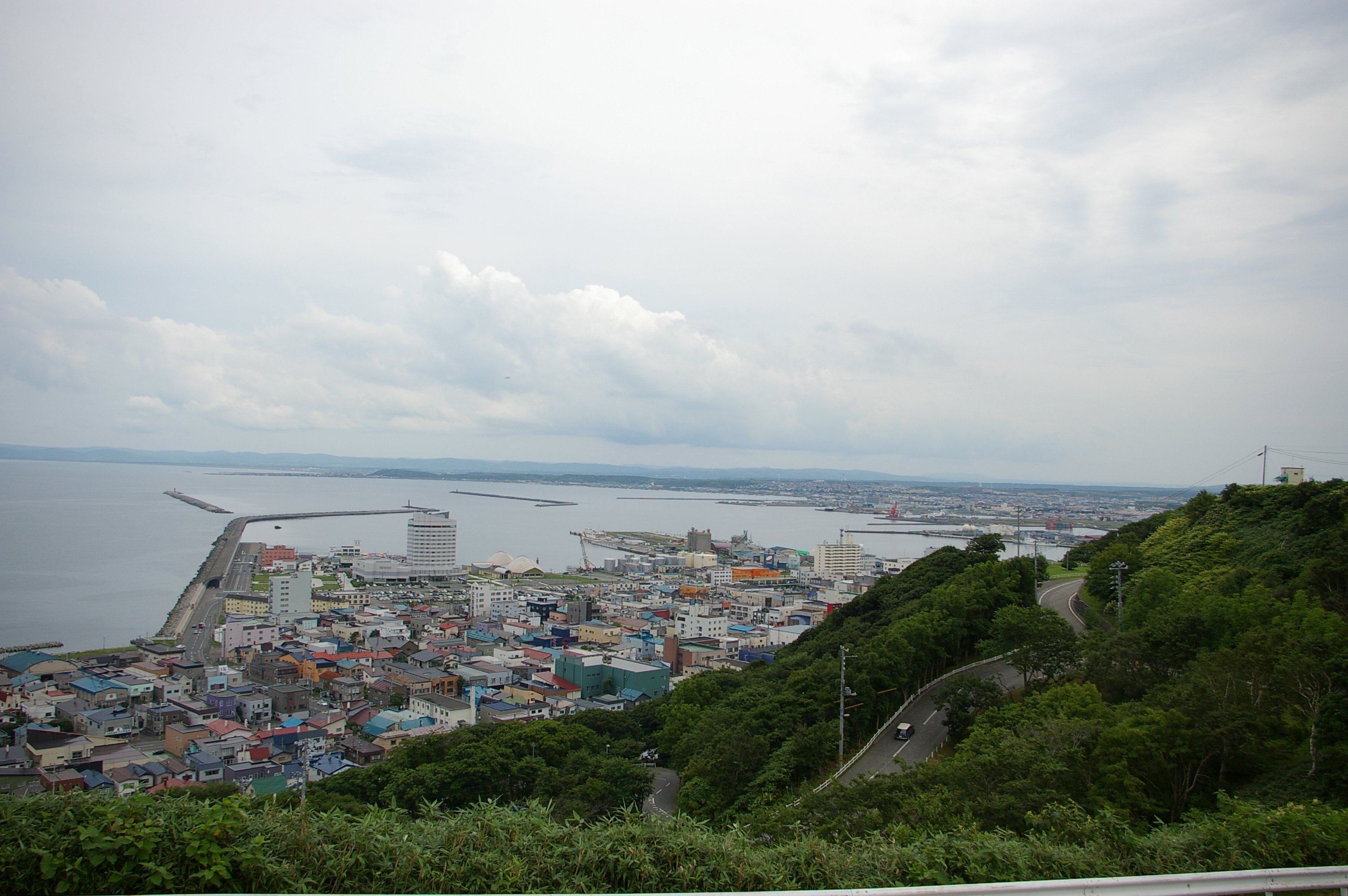 Wakkanai harbor.